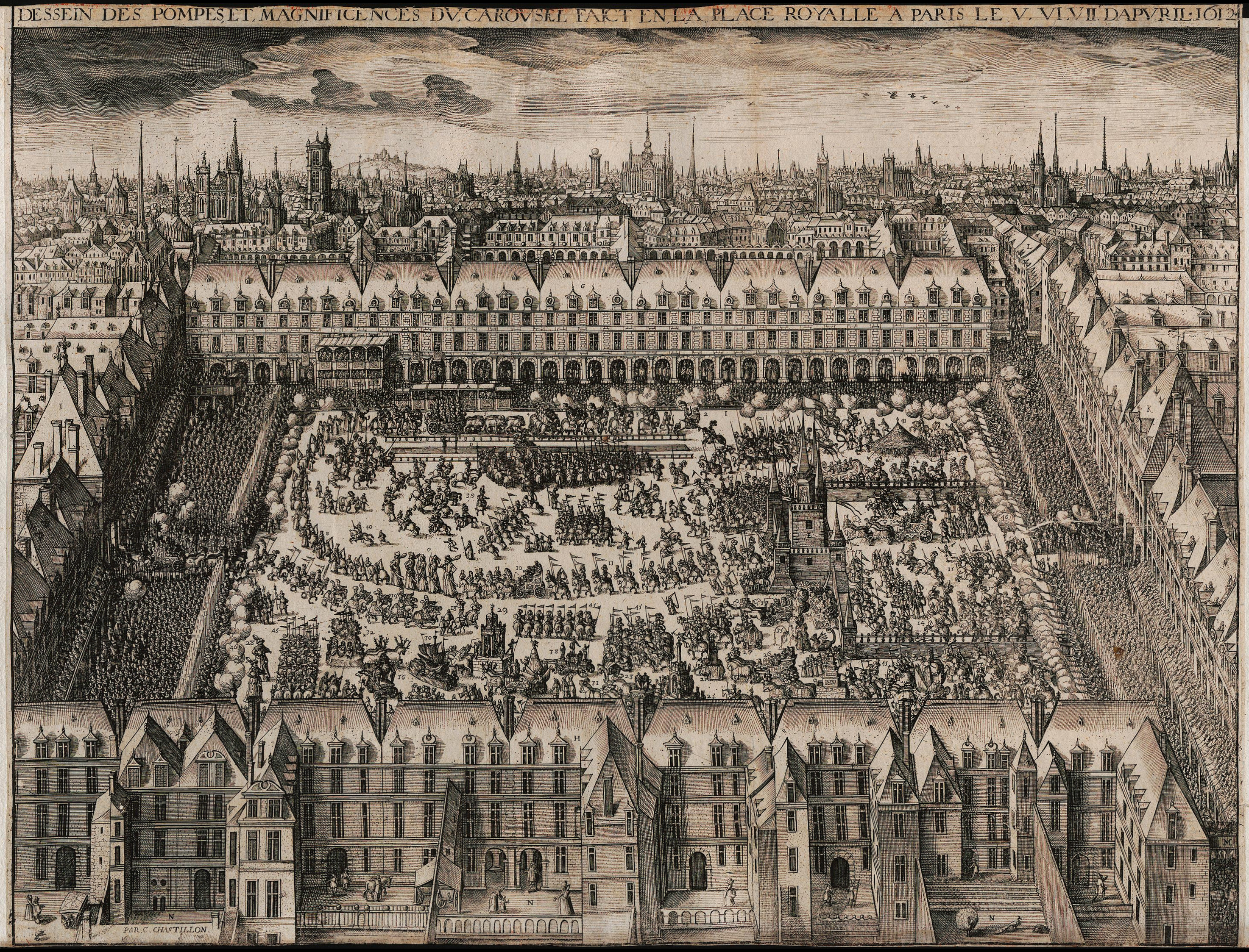 Grafik aus dem Klebeband Nr. 15 der Fürstlich Waldeckschen Hofbibliothek Arolsen Motiv: "Dessin des pompes et magnificences du Carousel faict en la place royalle à Paris le V. VI. VII. d'Aprvil 1612" Festlichkeiten zur Einweihung der Place Royale (heute Place des Vosges), 5.–7. April 1612, anlässlich der Doppelhochzeit von König Ludwig XIII. mit Anna von Österreich (1601–1666) und der Schwester des Königs, Elisabeth, mit dem künftigen König Philipp IV. von Spanien Beschreibung: File:Arolsen Klebeband 15 363.jpg